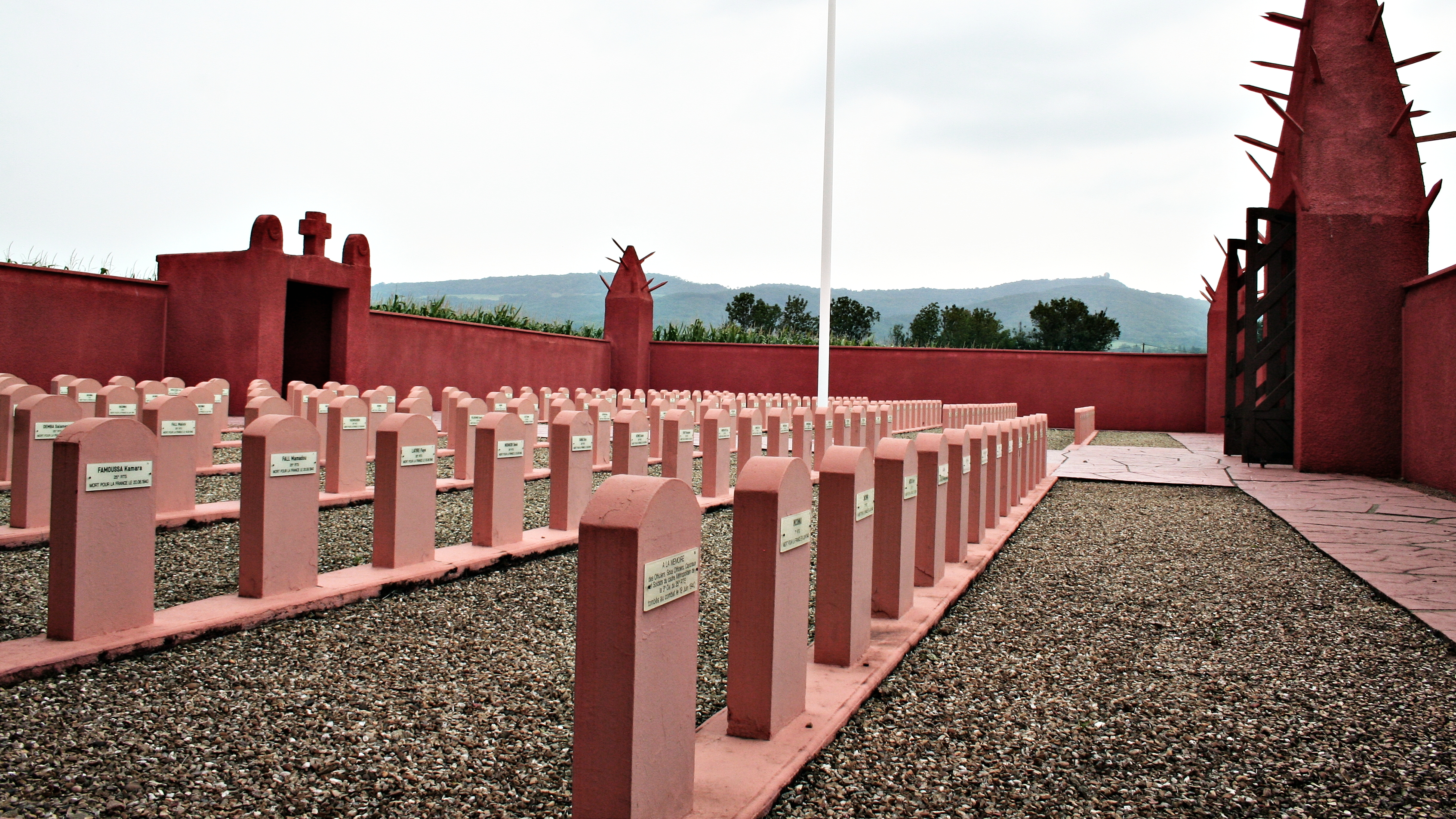 Le Tata sénégalais de Chasselay, nécropole militaire situé à Chasselay dans le Rhône, France.